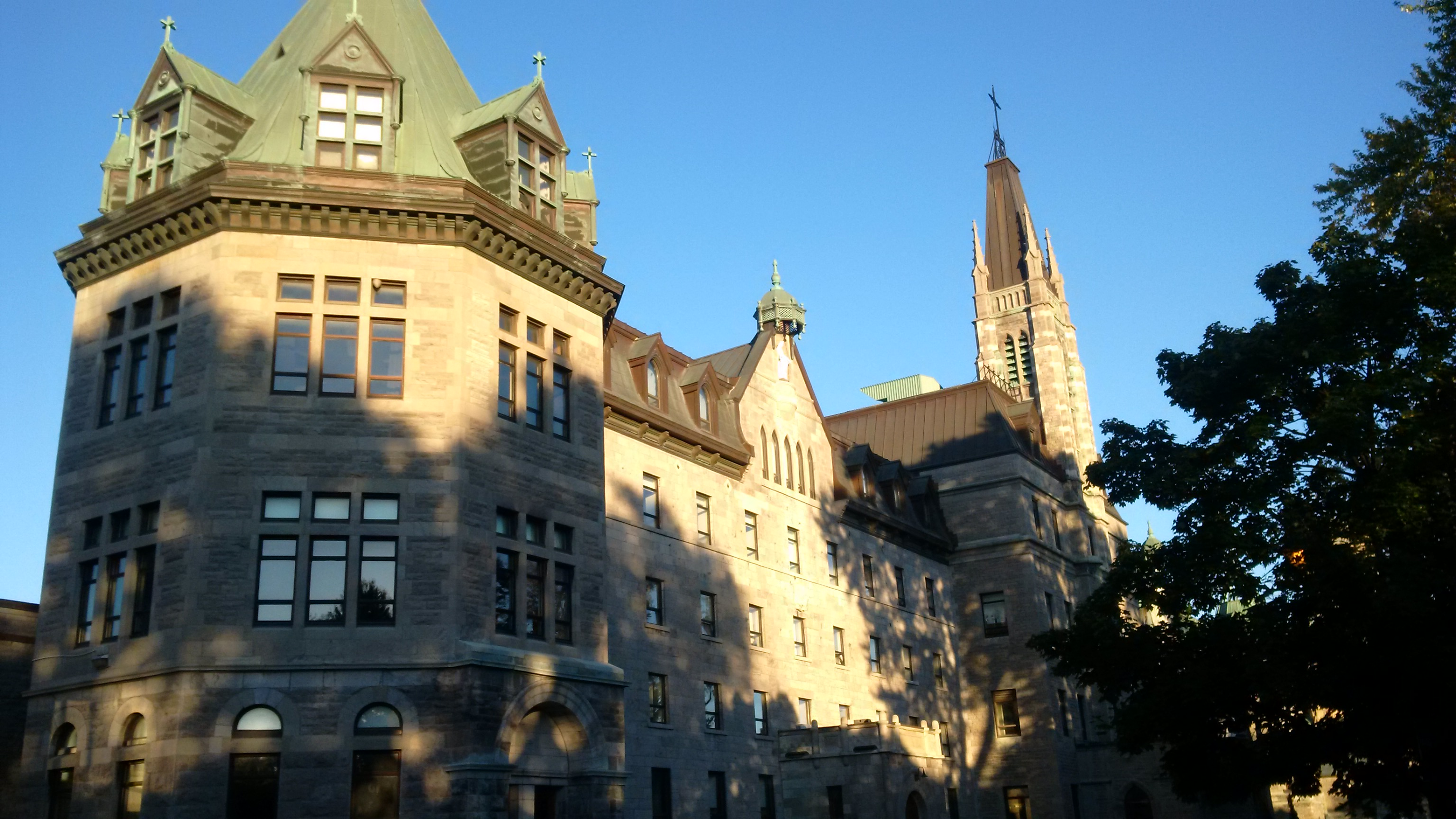 Vue d'ensemble sur le cégep Saint-Laurent.